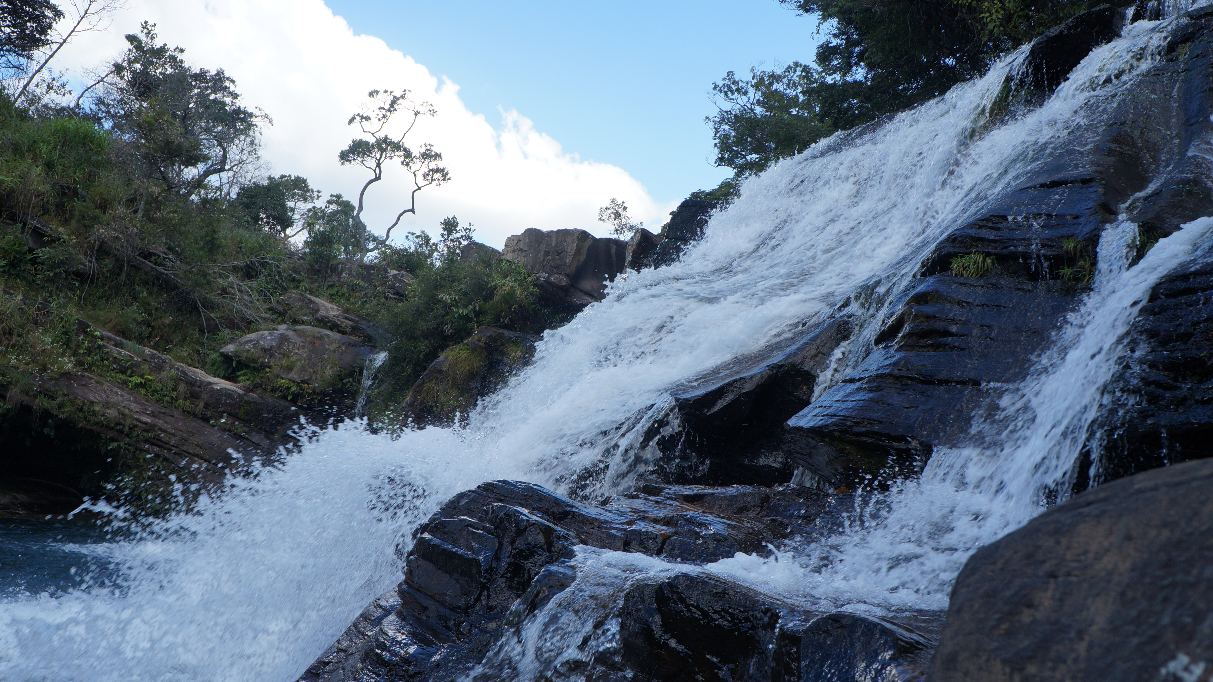 Queda d'água da cachoeira da Zilda, Carrancas-MG